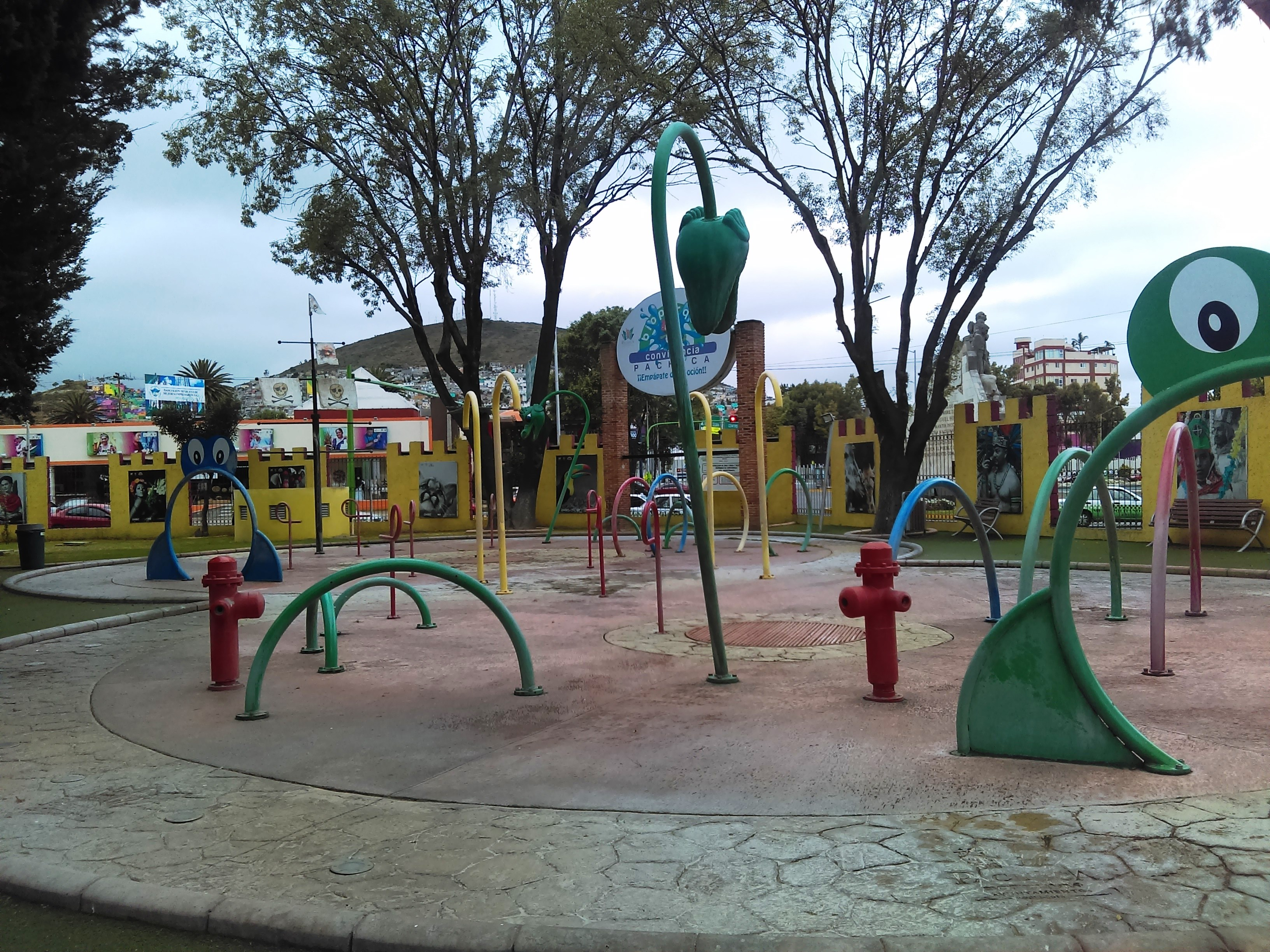 Bioparque de Convivencia en Pachuca, Hidalgo, México.